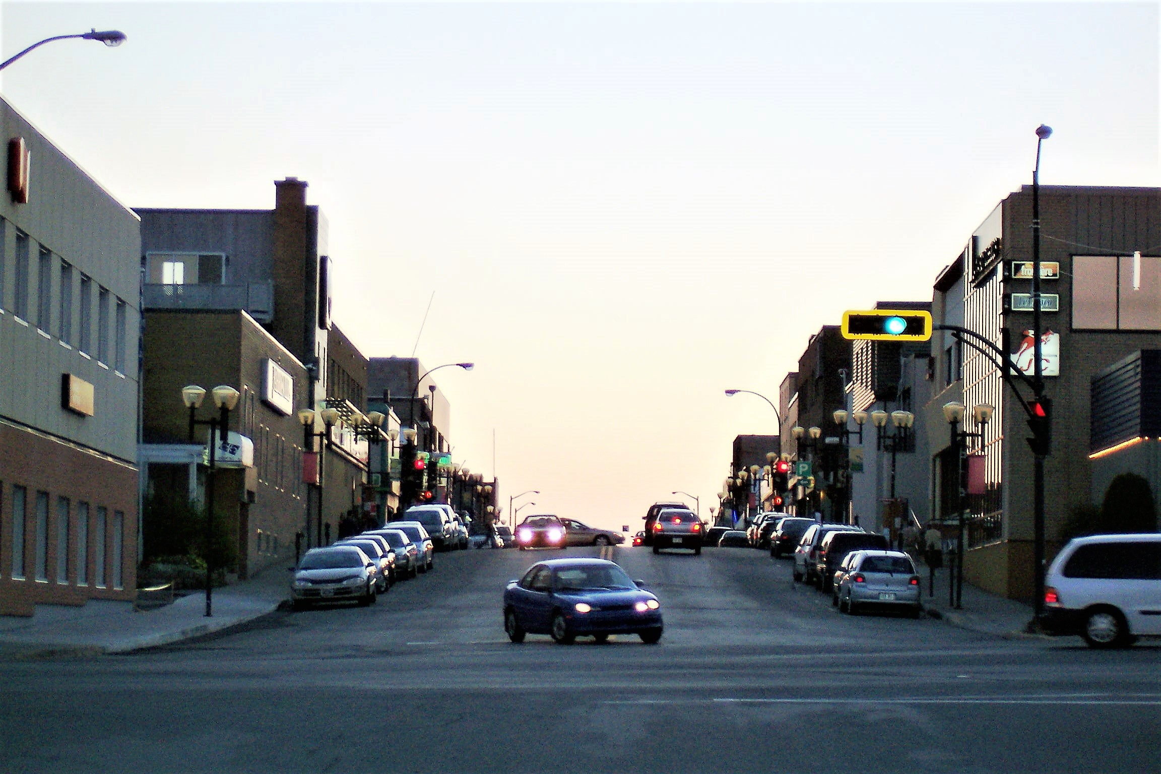 Rue Gamble près du lac à Rouyn-Noranda